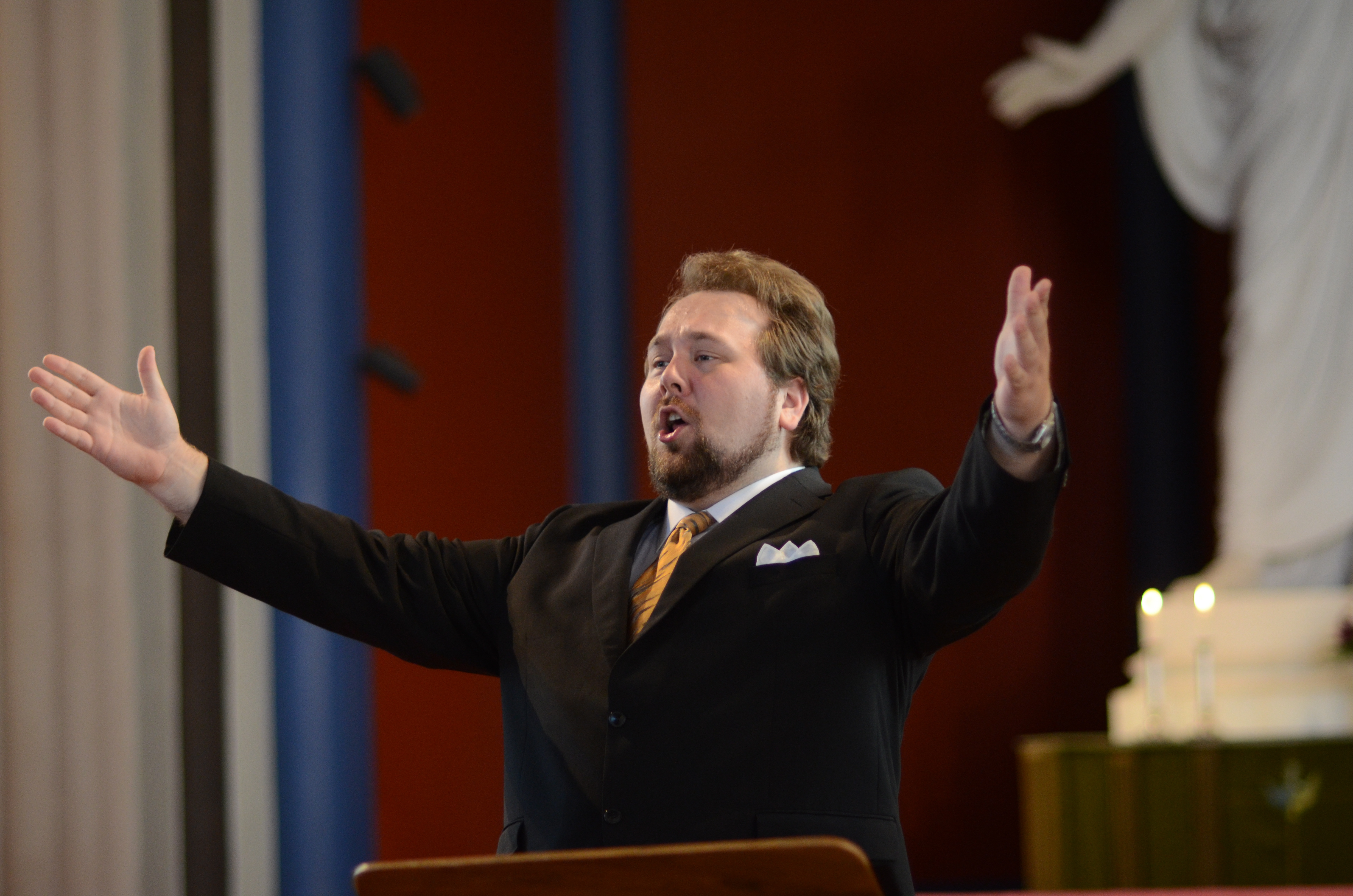 Matti Turunen